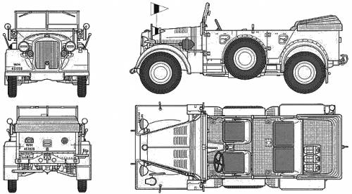 Plan du Horch